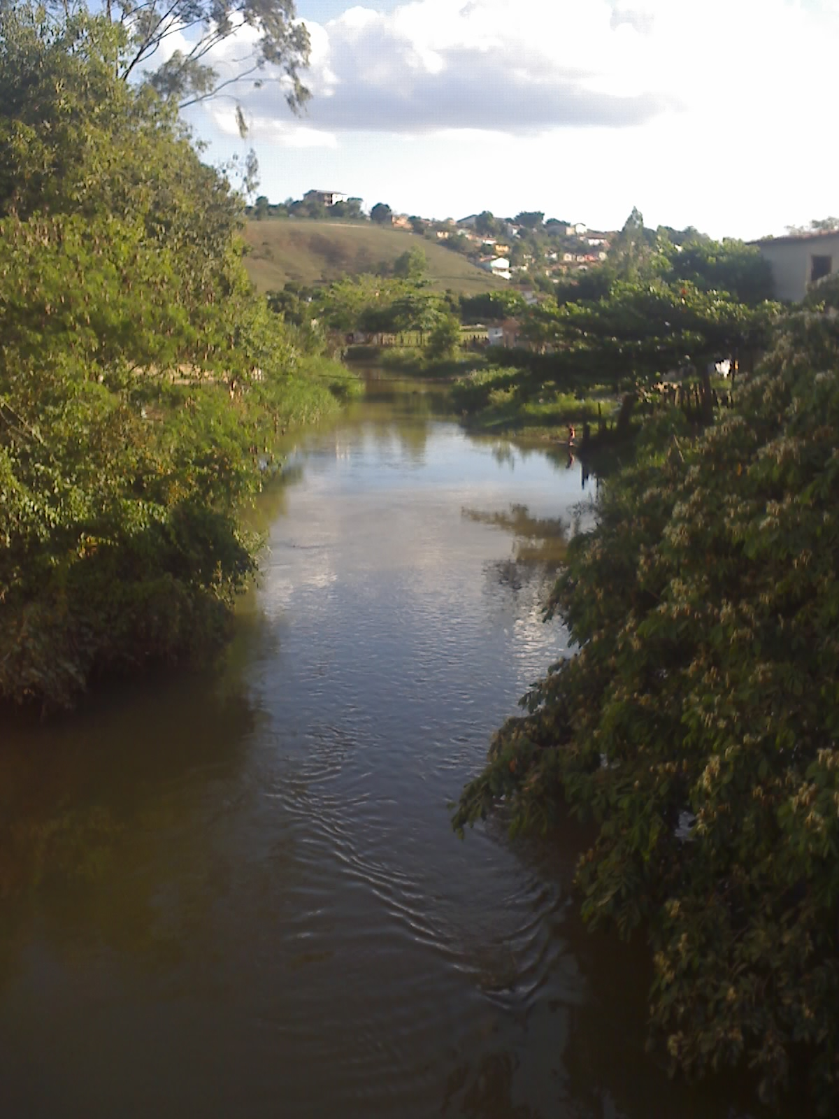 Foto do rio Água Fria